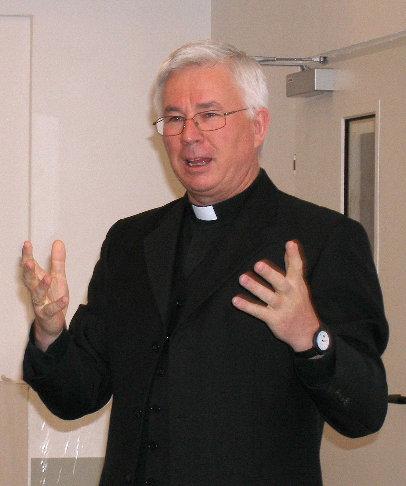 Erzbischof Dr. Franz Lackner als Weihbischof der Diözese Graz-Seckau im Rahmen eines Einkehrtages für Schülerinnen und Schüler des Akademischen Gymansiums Graz am 16. April 2007